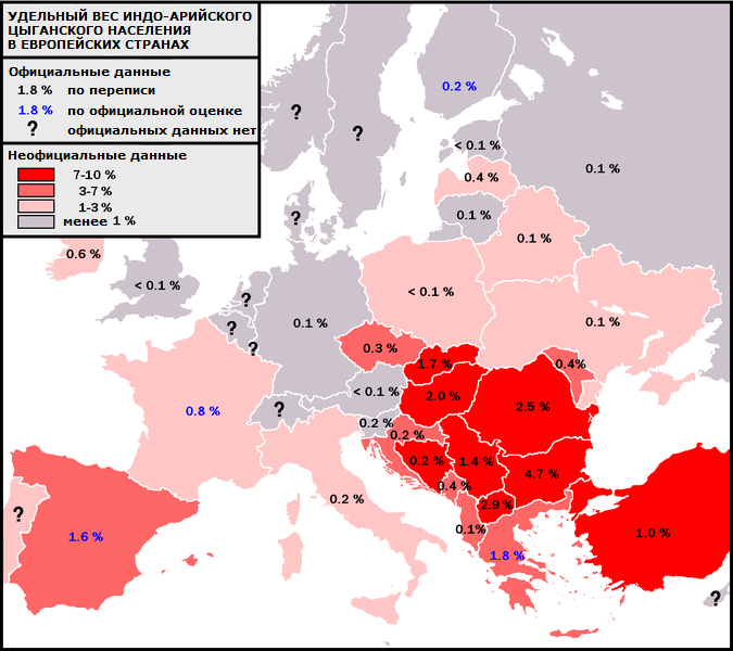 Карта присутствия цыганского населения в Европе